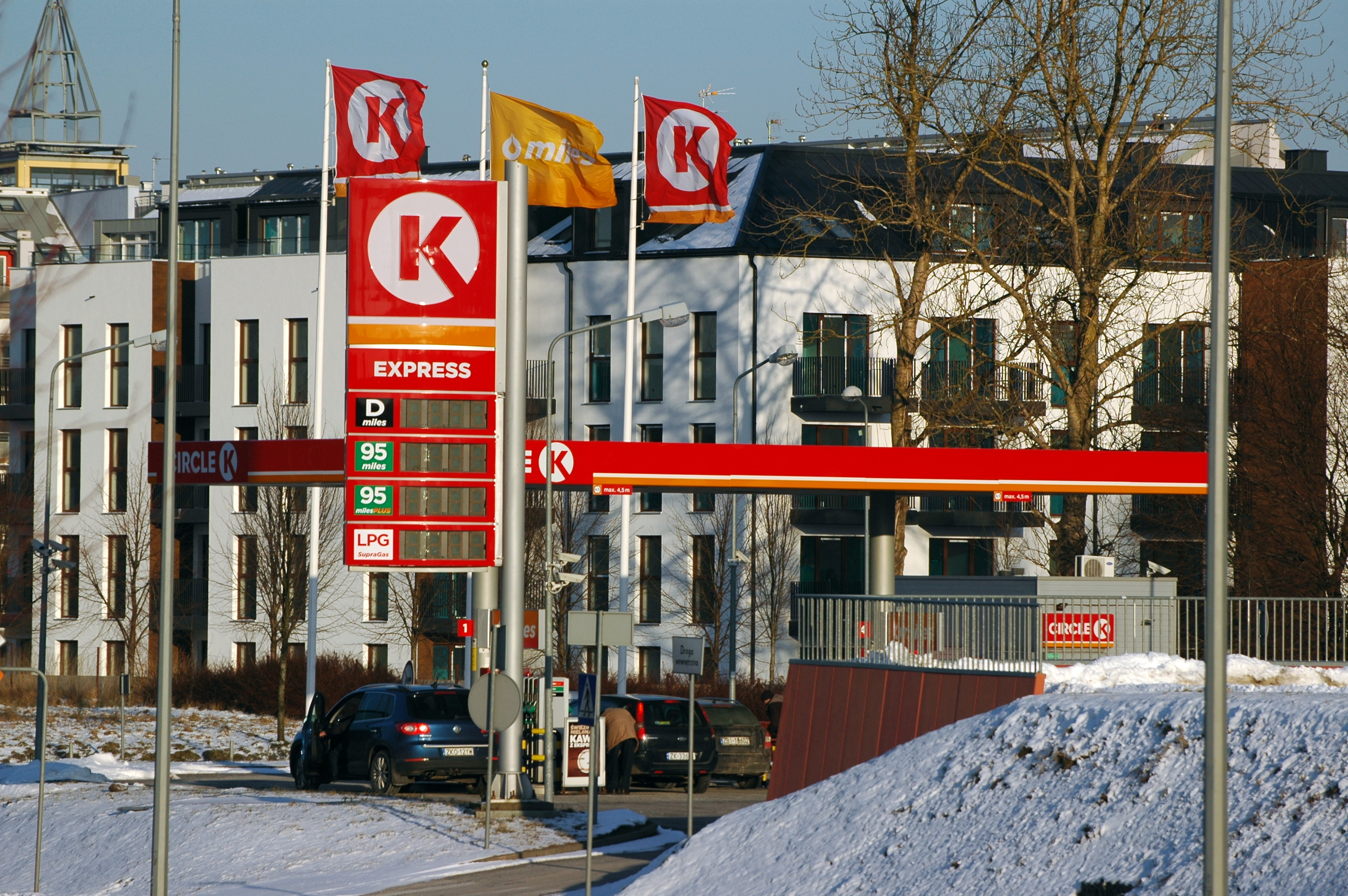 Koszalin - Circle K (dawniej Lotos)